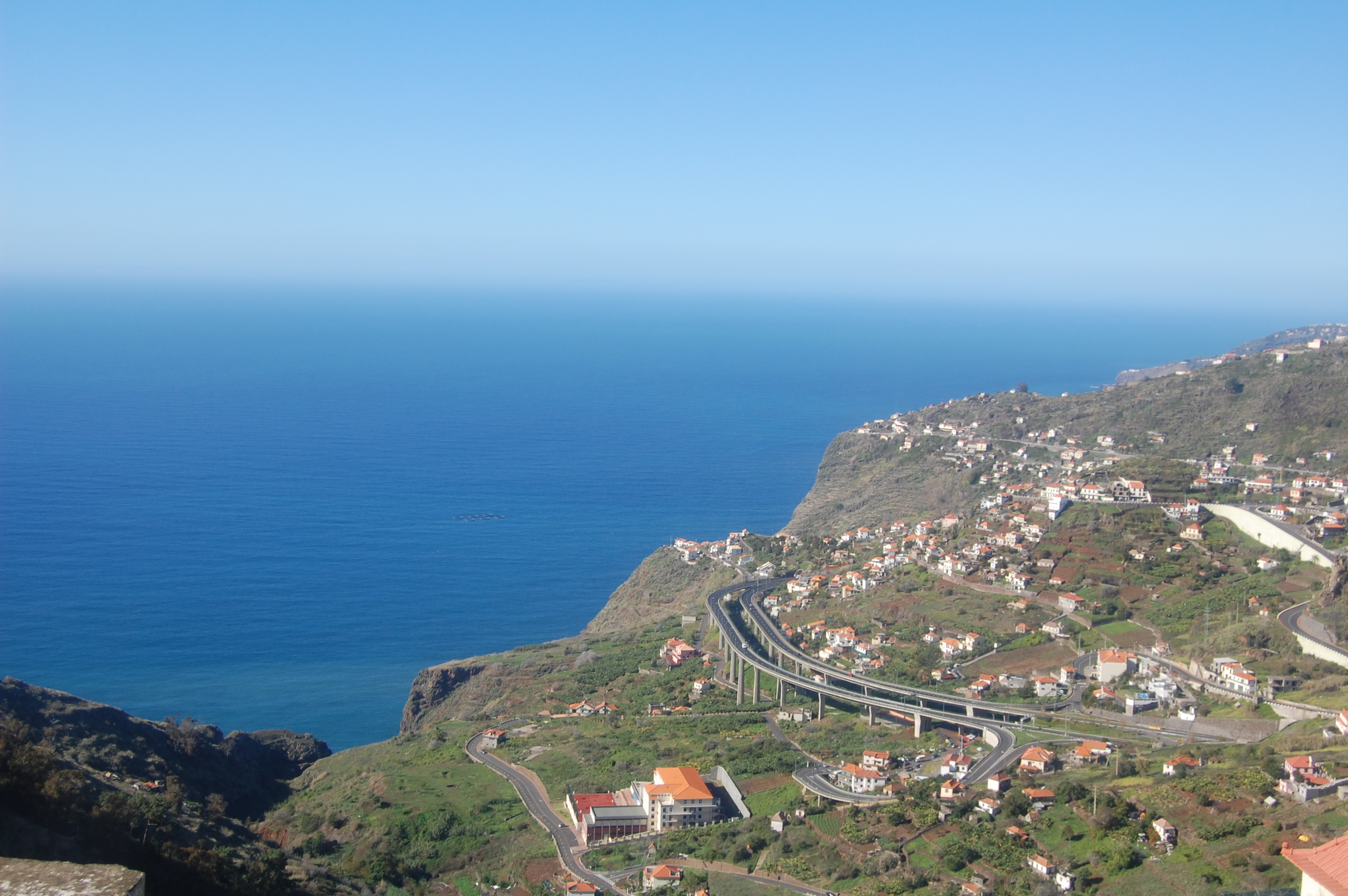 Quinta Grande and Campanário, Madeira